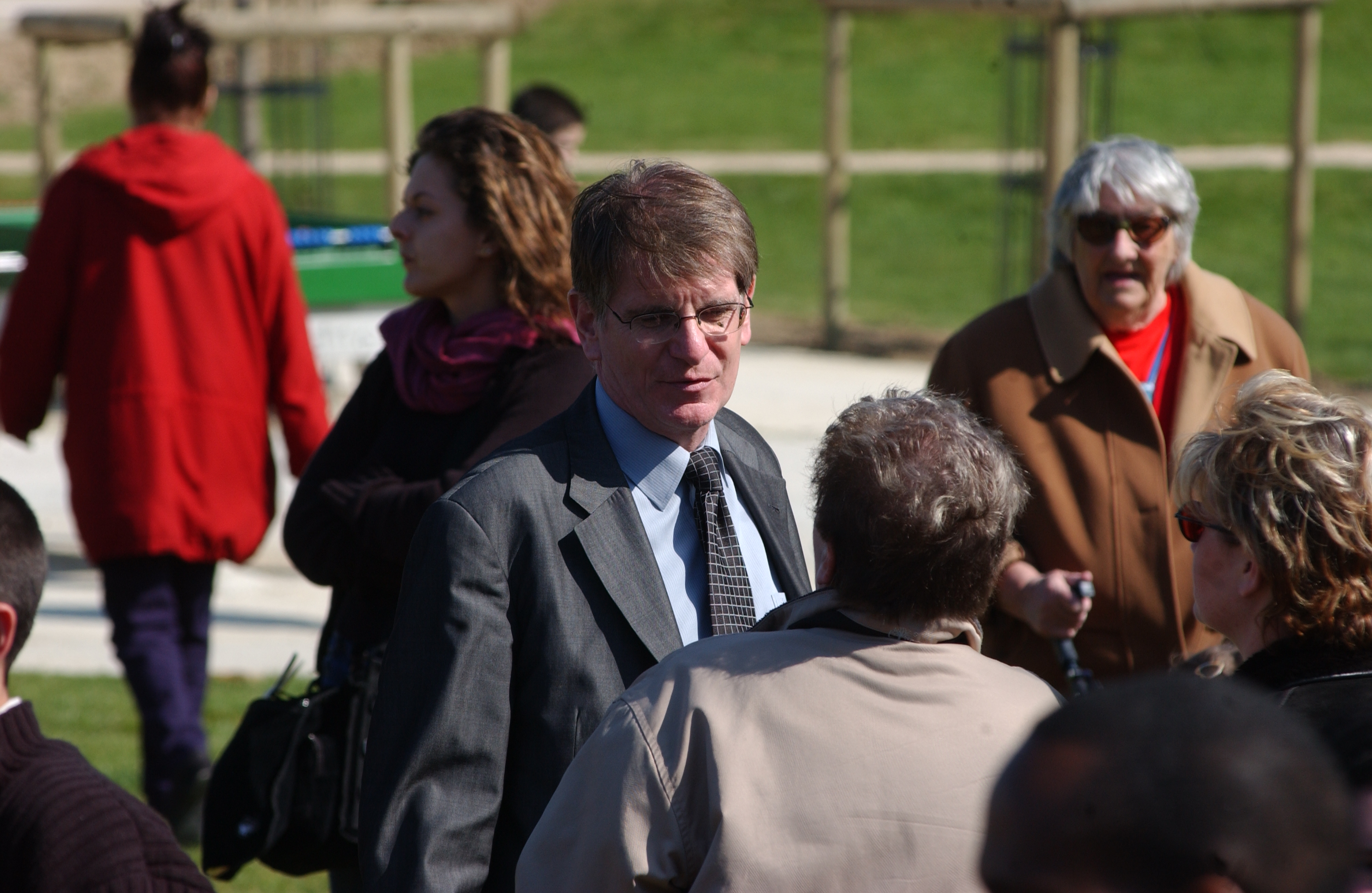 Patrick Braouézec, président de la communauté d'agglomération plaine Commune, député de Seine-Saint-Denis, conseiller municipal de Saint-Denis délégué aux affaires internationales. Crédit photo : Gérard Monico, Ville de Saint-Denis Licensing Catégorie:Saint-Denis